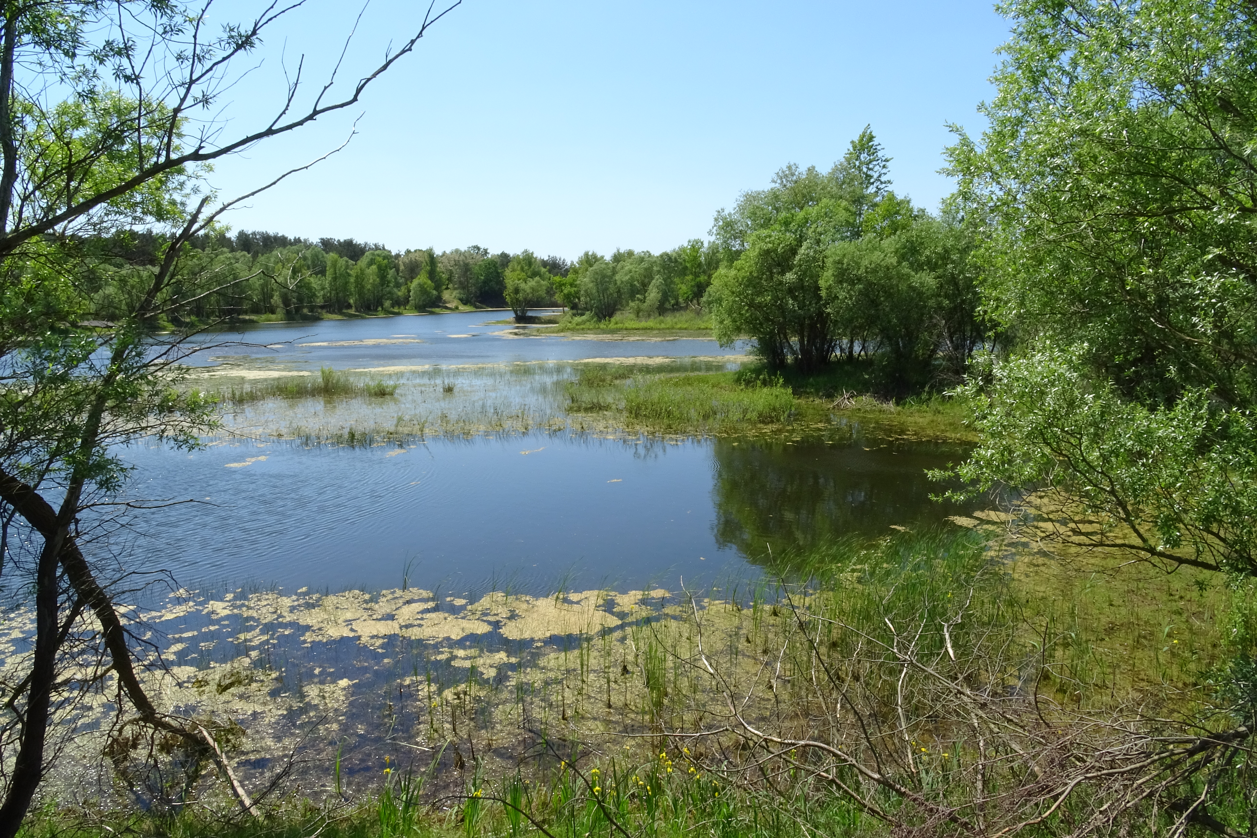 Ein durch Sandabbau entstandener See im Naturschutzbegiet Taufwiesenberge.